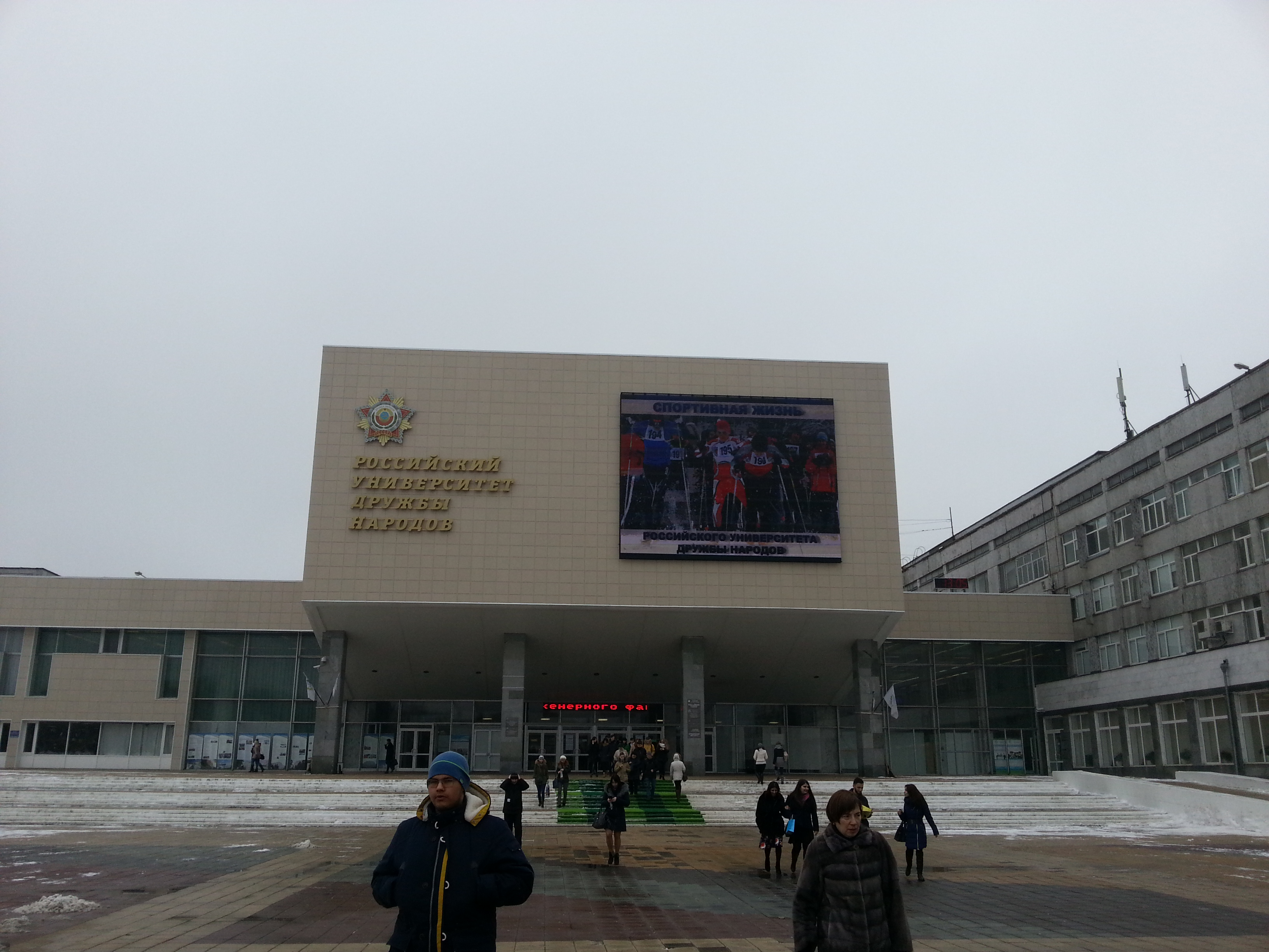 Здание Российского университета дружбы народов. 13 февраля 2016г.